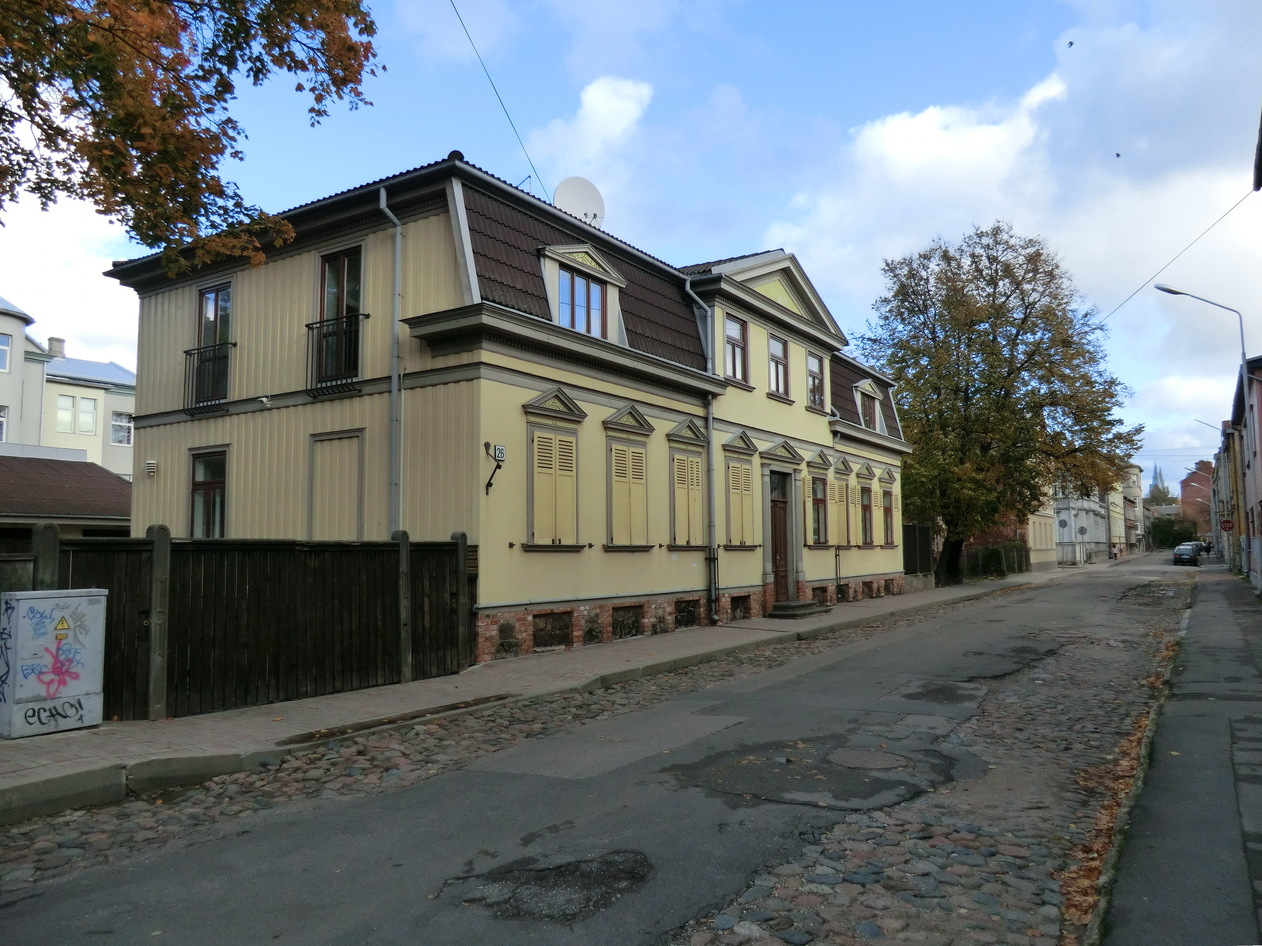 Rožu iela 26, Liepāja